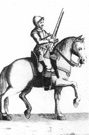 Рейтары XVII века